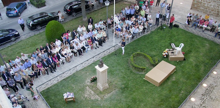 El dia de la inaguracion